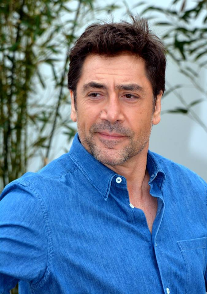 Javier Bardem au festival de Cannes